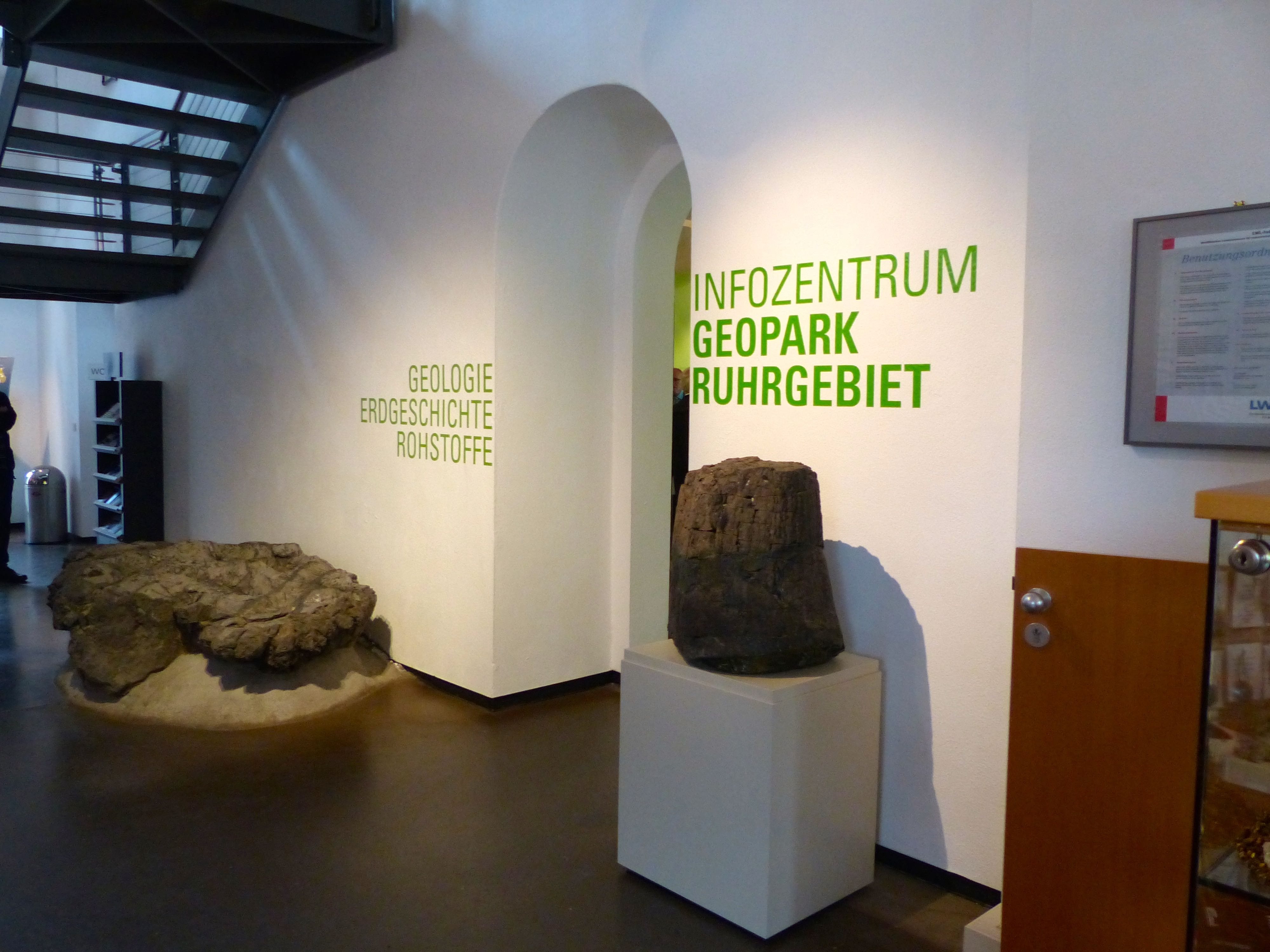 Zeche Nachtigal: Infozentrum des Geoparks Ruhrgebiet